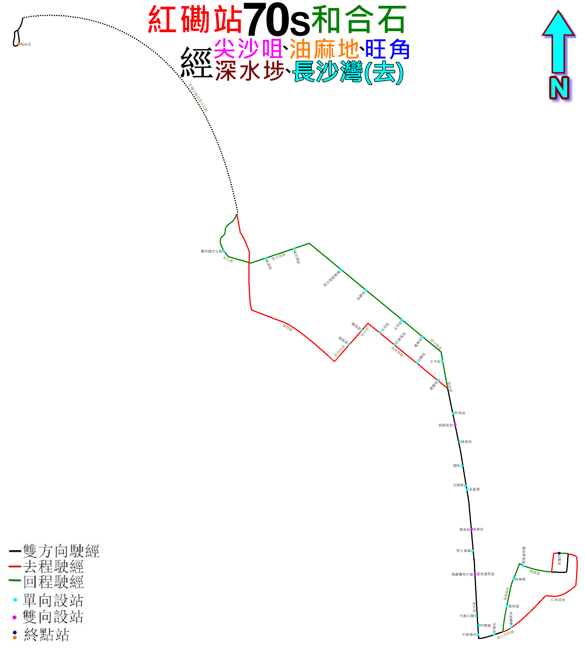 中文（香港）: 九巴70S線的走線圖